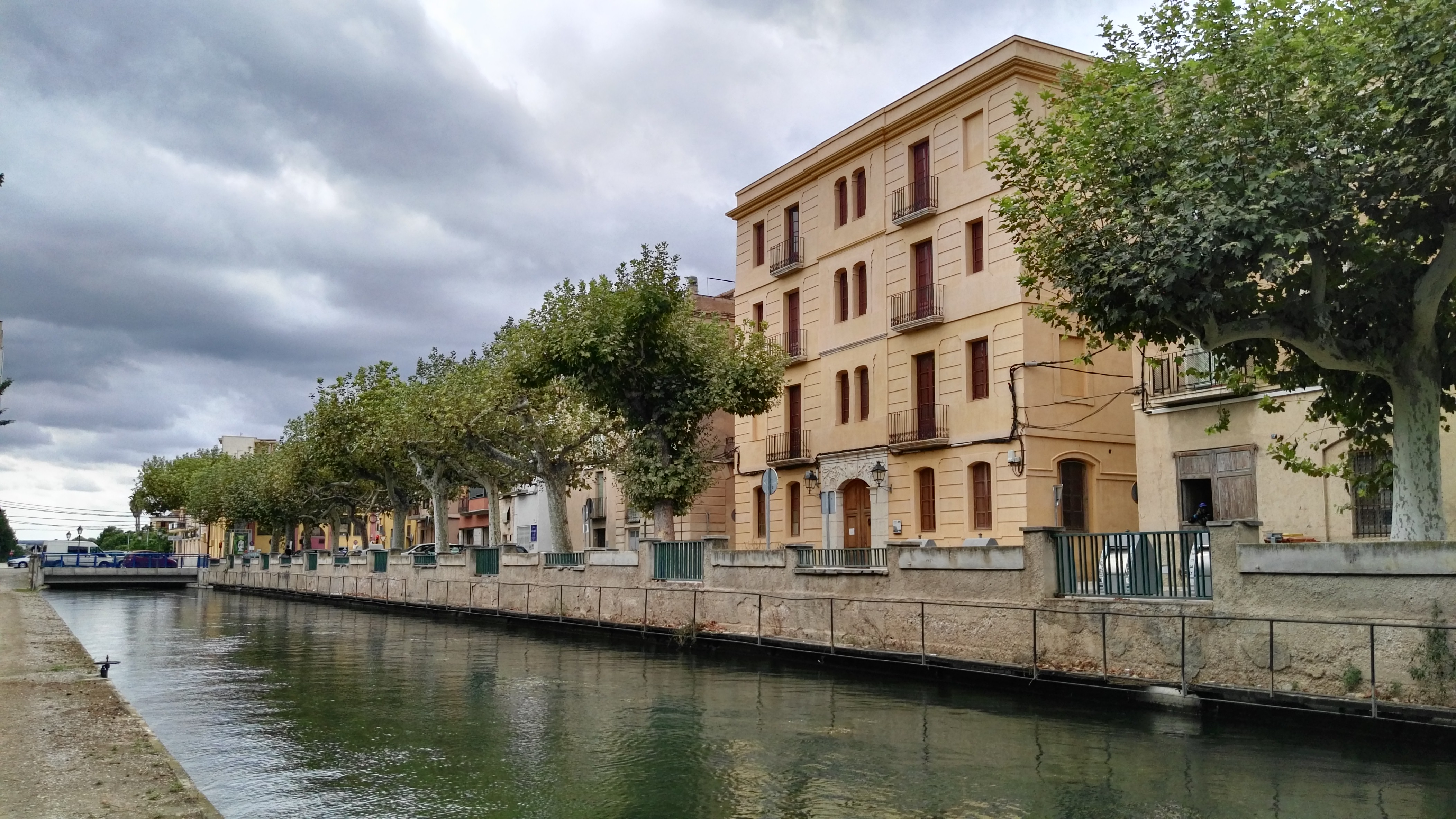 Ajuntament vell de Roquetes, vora el Canal de la Dreta de l'Ebre, Roquetes (Baix Ebre)